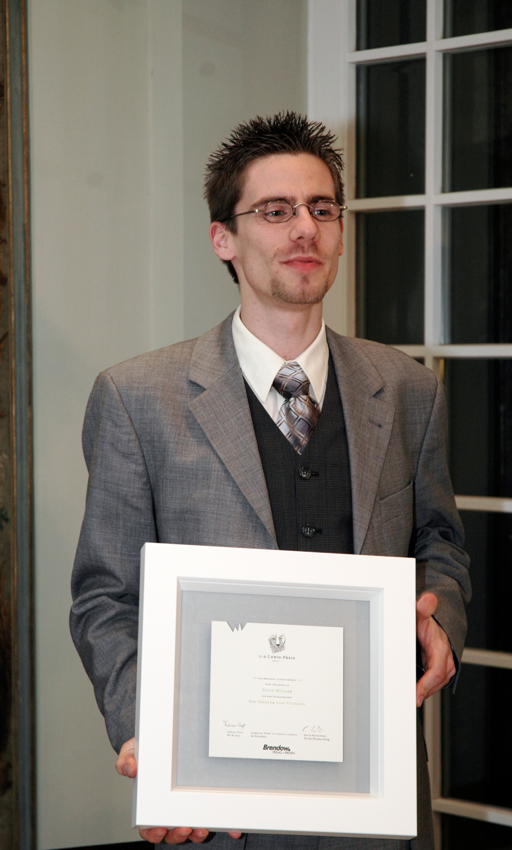 Der Buchautor Titus Müller am 30. Januar bei der Verleihung des C.S. Lewis-Preises